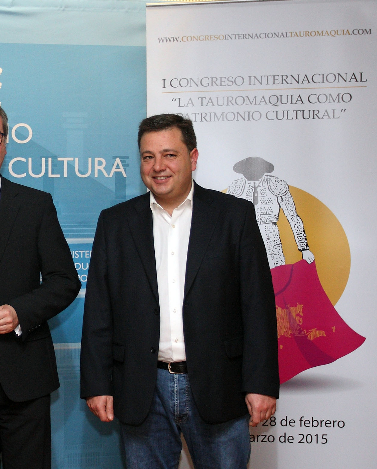 Marín presenta I congreso Internacional La Tauromaquia como Patrimonio Cultural